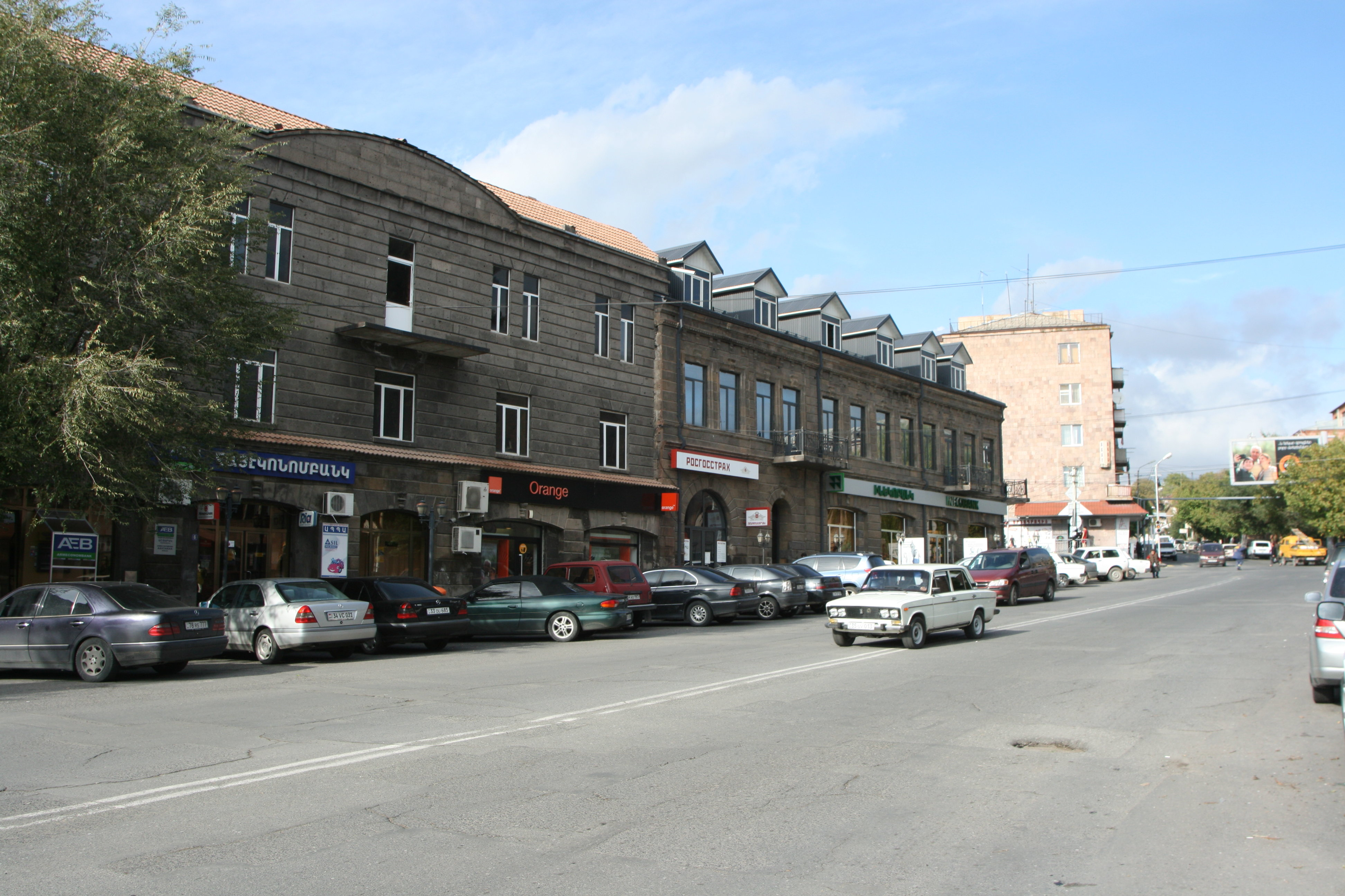 Ashtarak, Armenia